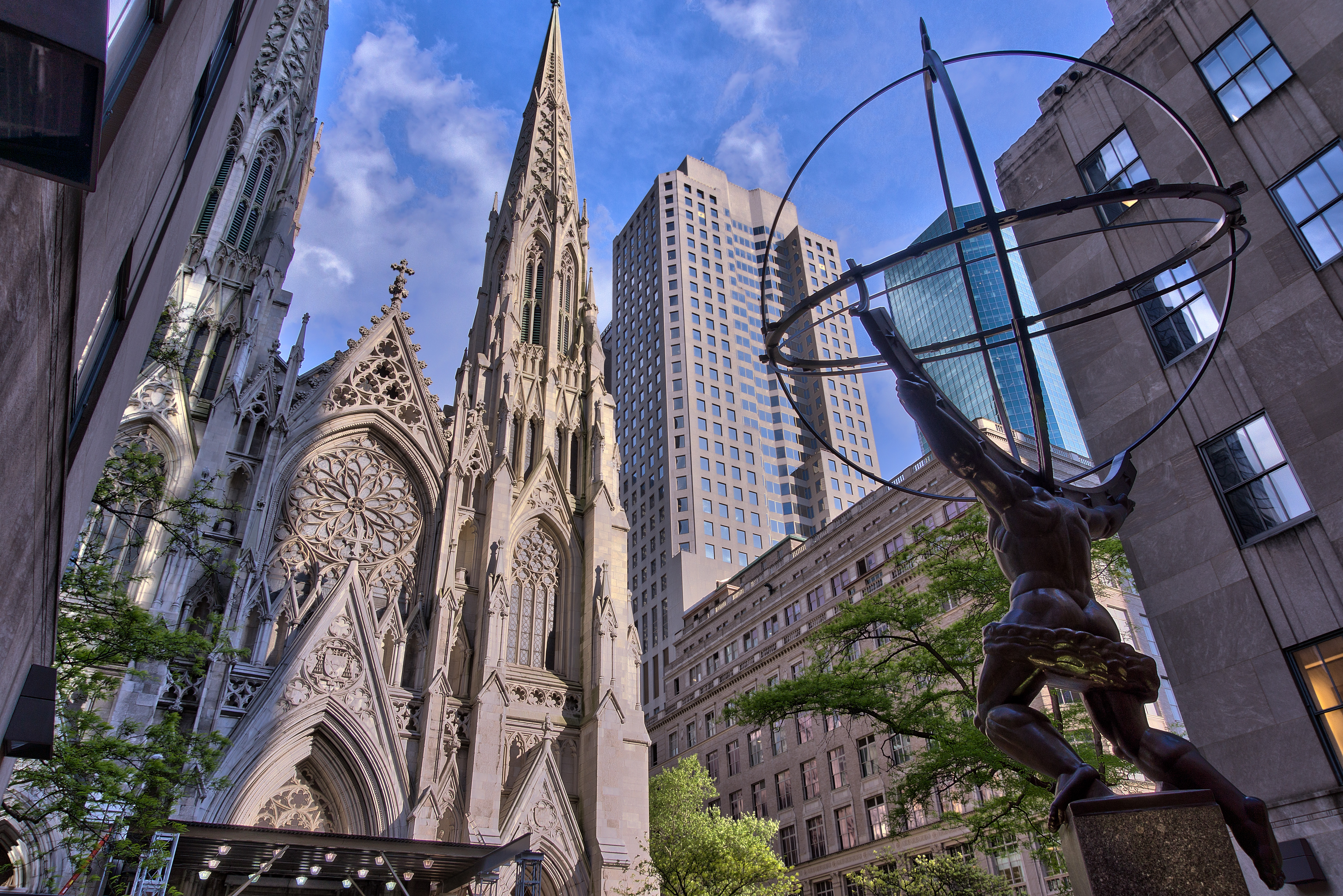 Façade de la Cathédrale St Patrick, et l'Atlas du Rockfeller Center